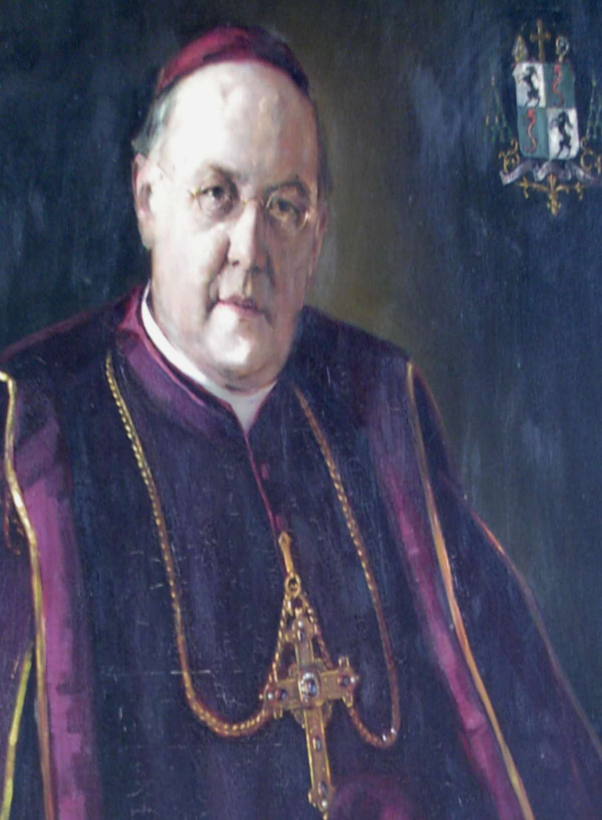 Georgius Schmid von Grüneck (1851-1932) Bischof von Chur 1889-1908